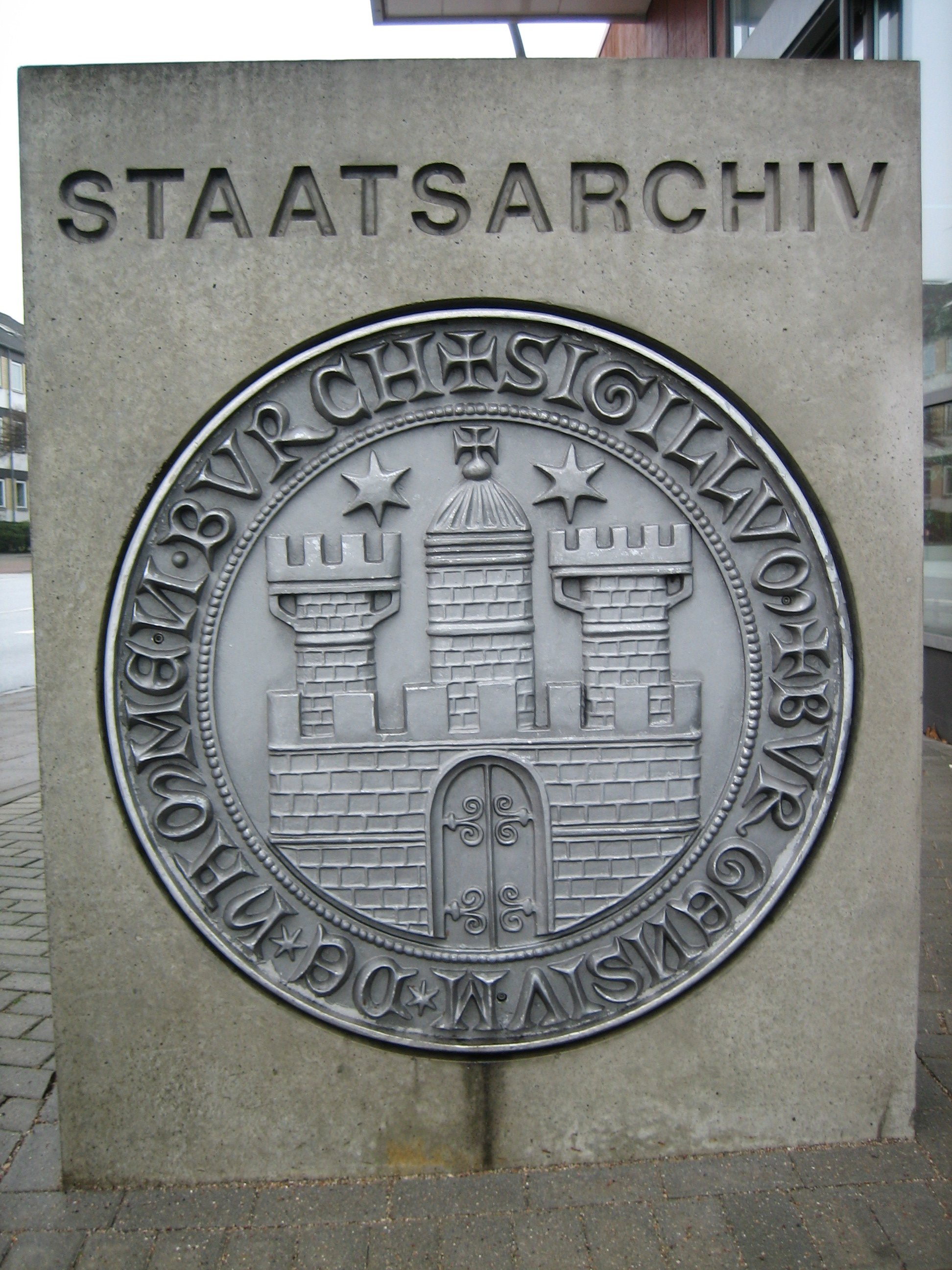 Siegel mit lateinischer Inschrift im Eingangsbereich des Staatsarchives Hamburg.